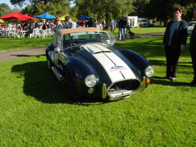 Robnell Cobra replica